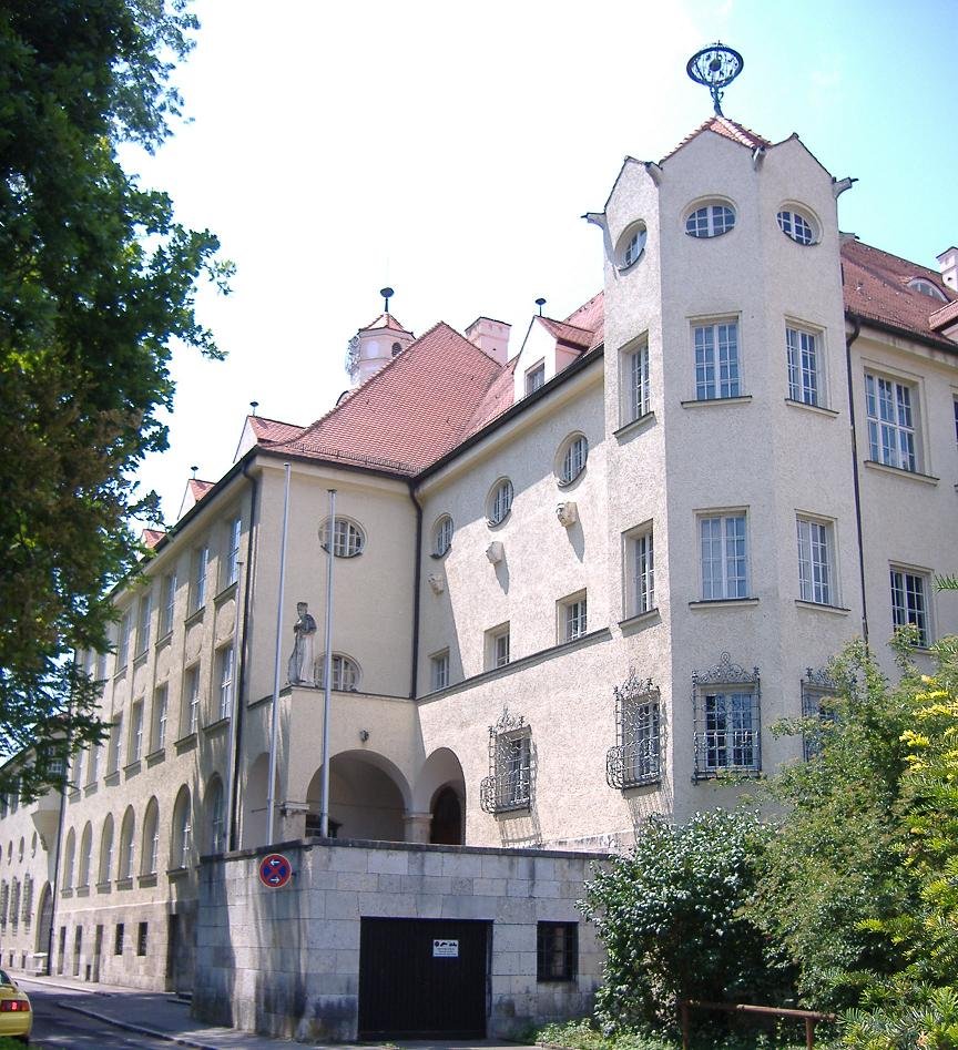 Das Christoph-Scheiner Gymnasium in Ingolstadt.